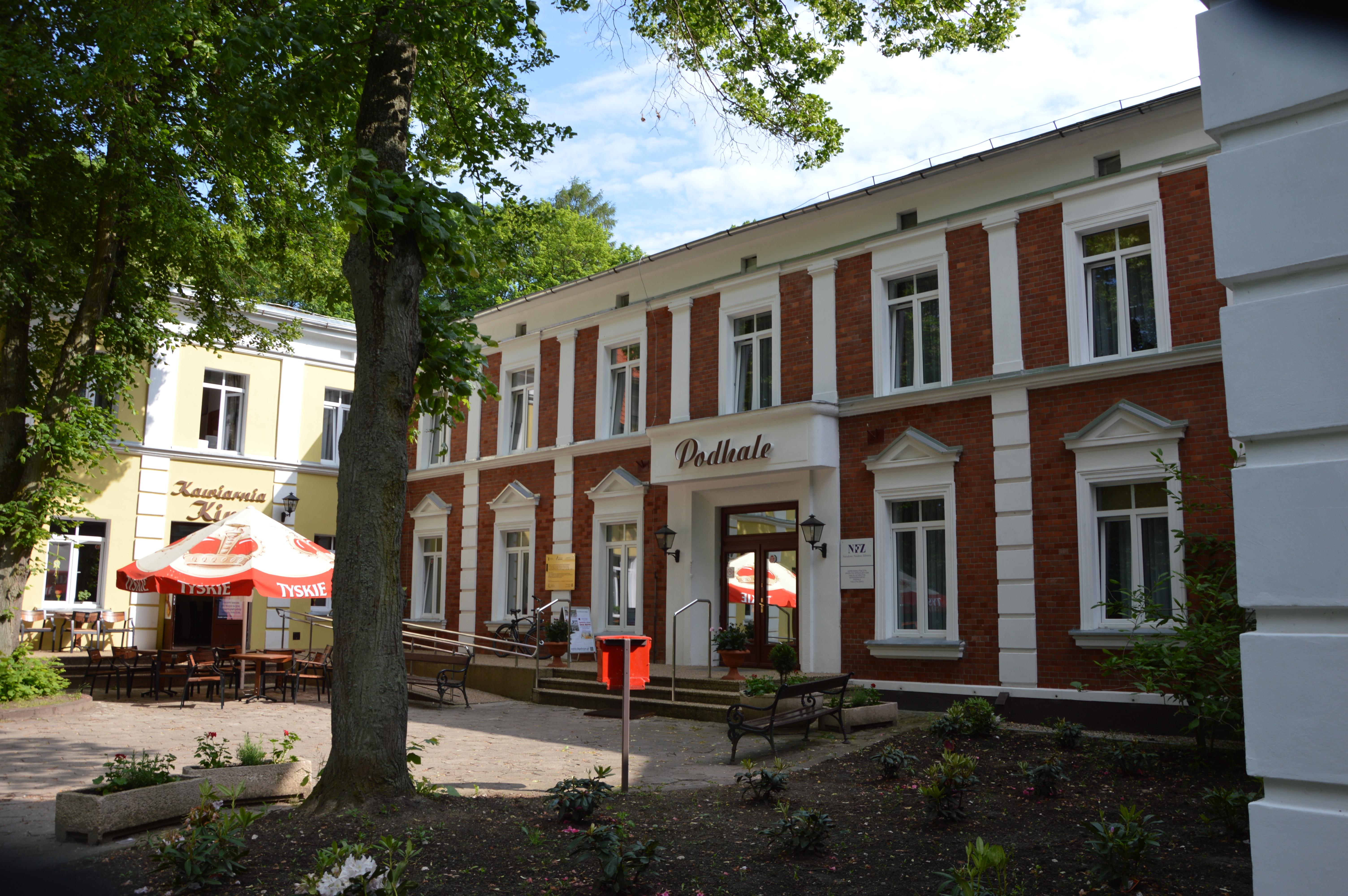 Połczyn Zdrój